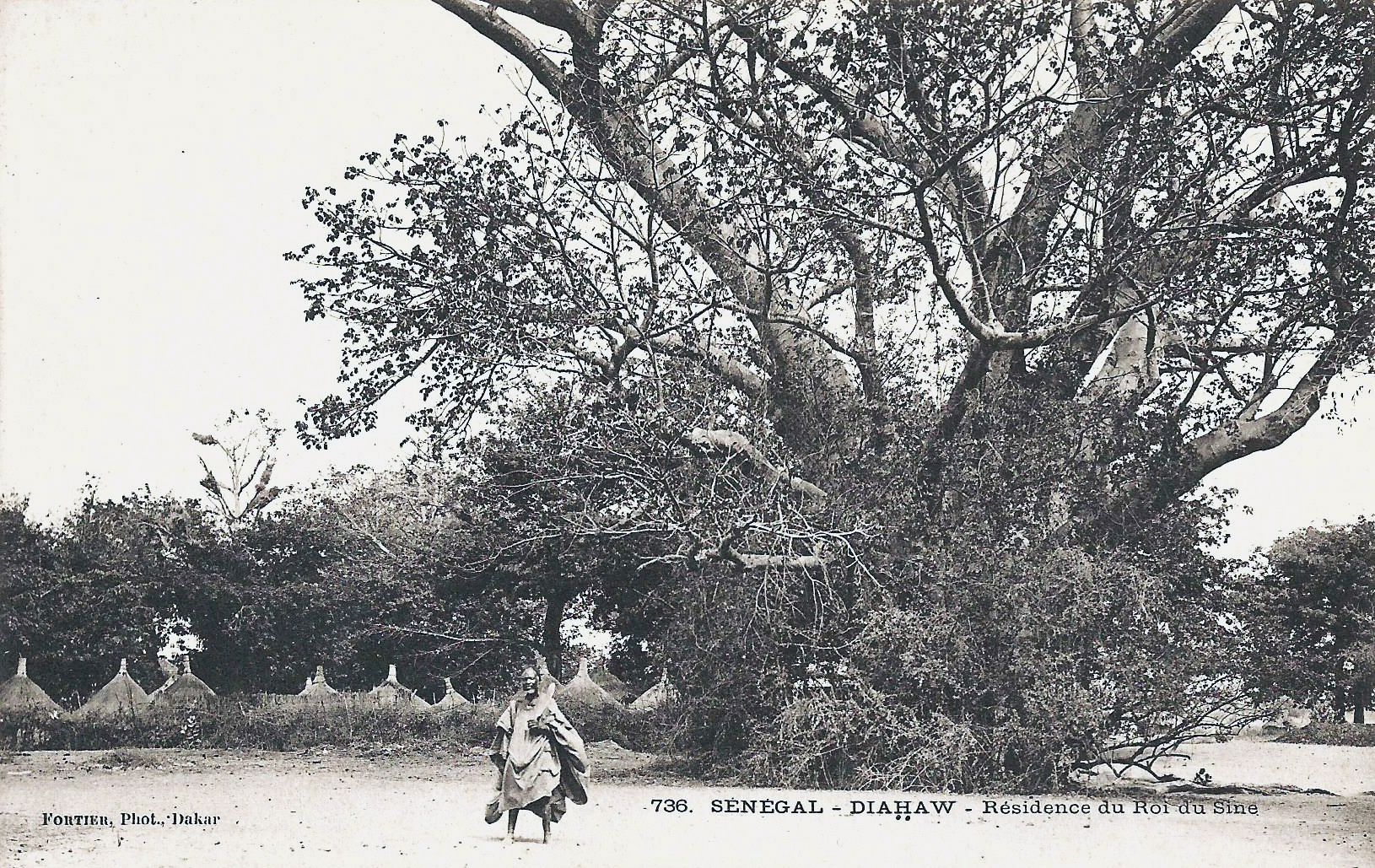 François-Edmond Fortier, Diahaw. Résidence du roi du Sine. Afrique Occidentale - Sénégal.